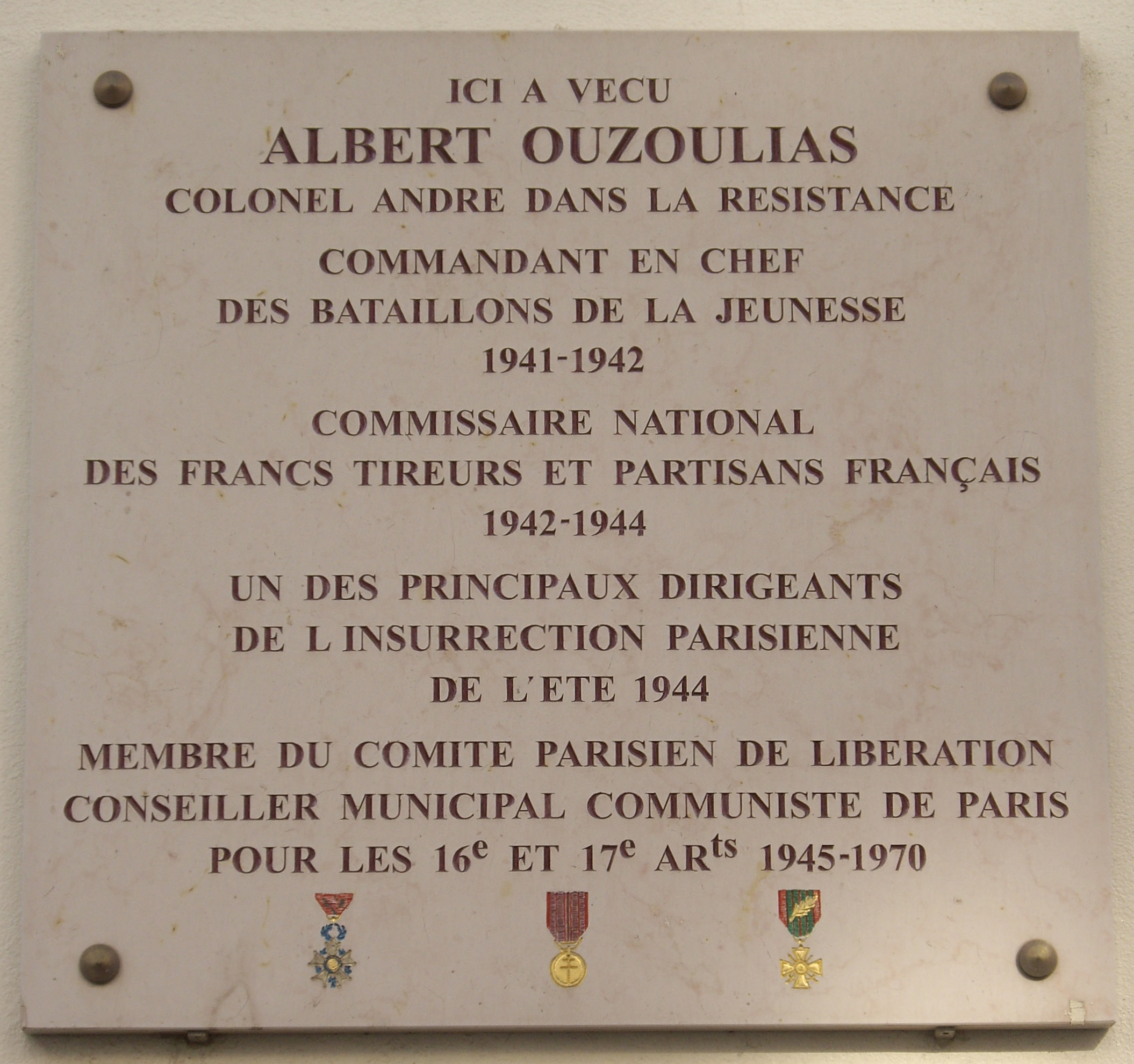 Plaque commémorative, 9 rue du Général-Niox, Paris 16e.« Ici a vécu Albert Ouzoulias, colonel André dans la Résistance, commandant en chef des Bataillons de la Jeunesse, 1941-1942, commissaire national des Francs-tireurs et partisans français, 1942-1944, un des principaux dirigeants de l'insurrection parisienne de l'été 1944, membre du Comité parisien de Libération, conseiller municipal communiste de Paris pour les 16e et 17e arrondissements, 1945-1970. »